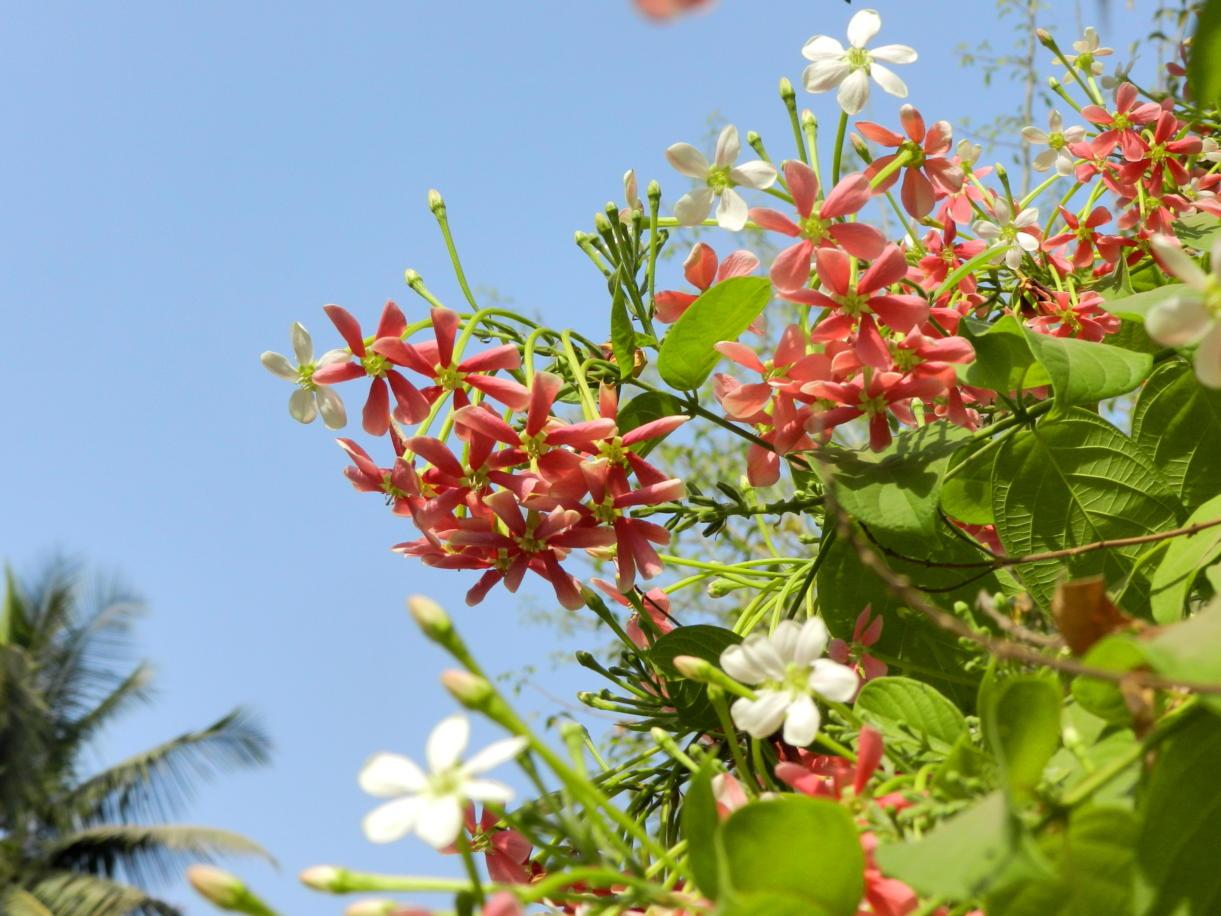 मधुमालतीची फुले